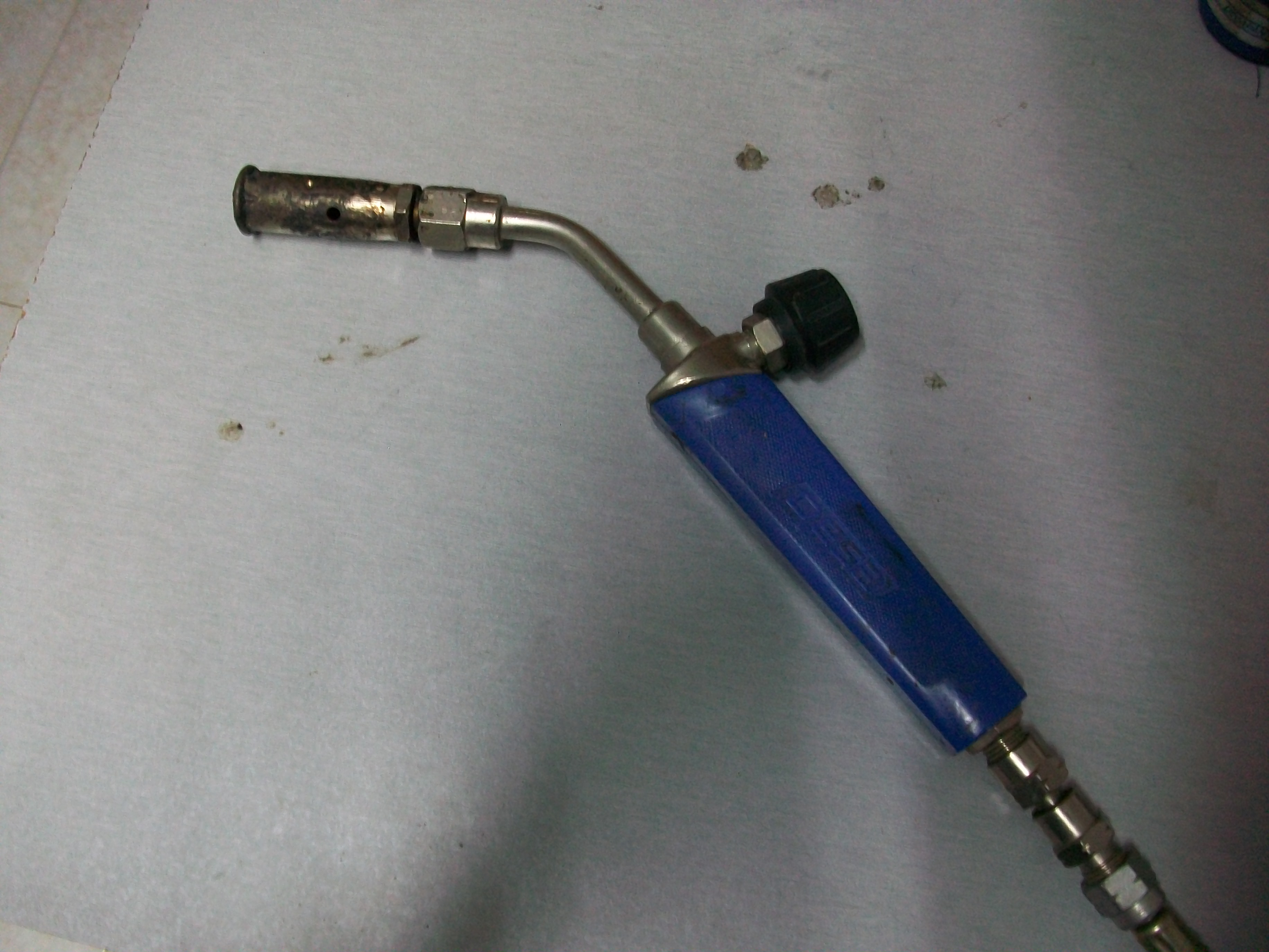 Se utiliza para calentar la pieza que debemos realizar la soldadura